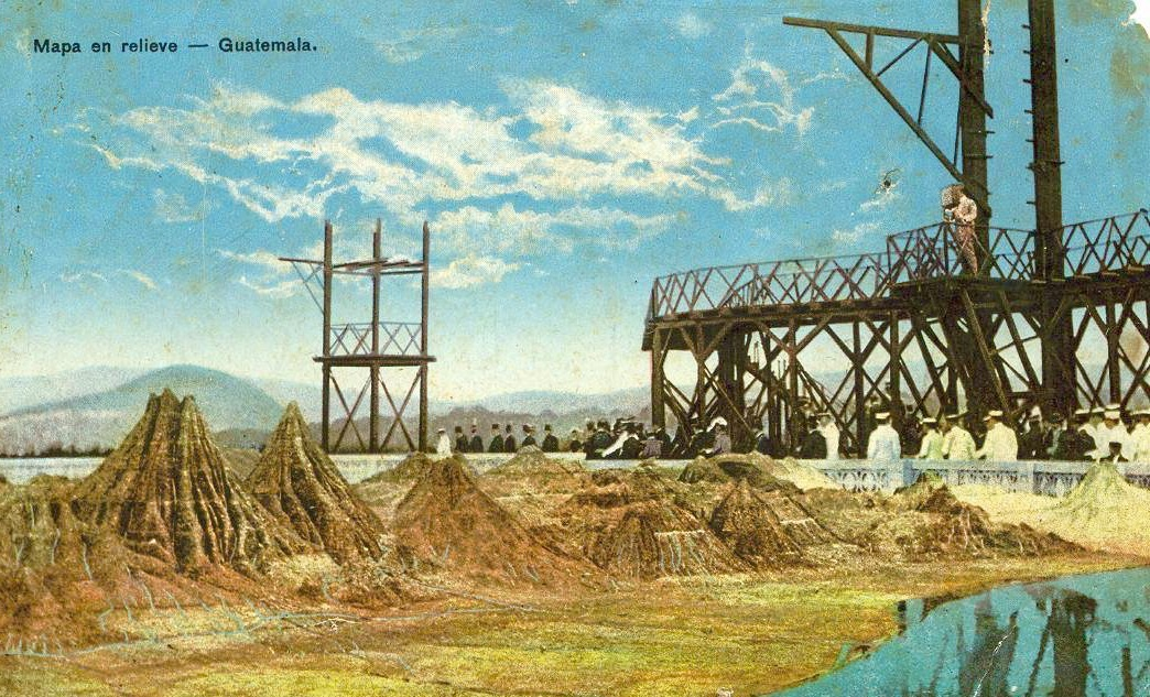 Grabado de 1905 del Mapa en Relieve de Guatemala. Museo Nacional de Historia de Guatemala.